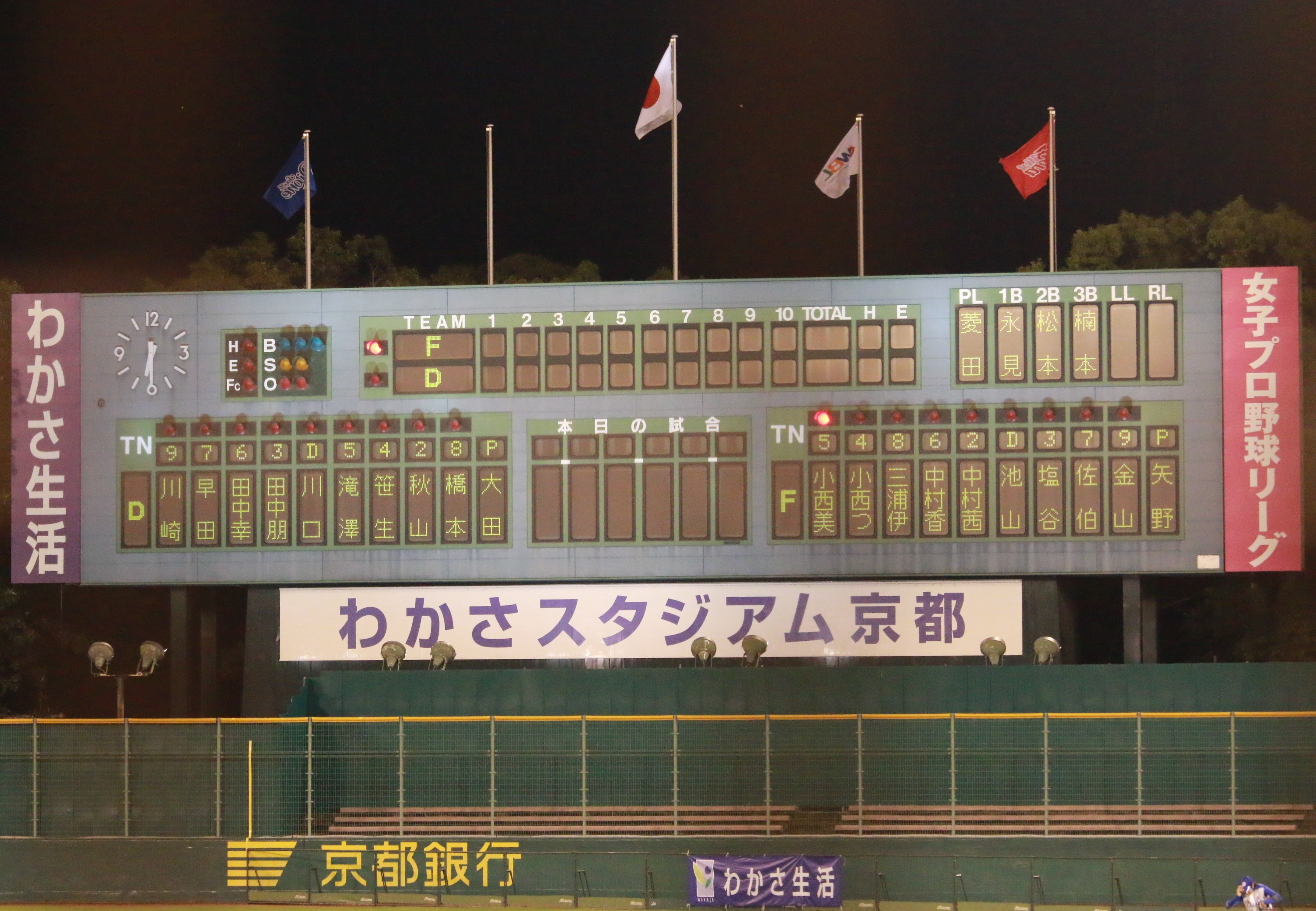 2014年、わかさスタジアム京都のスコアボード